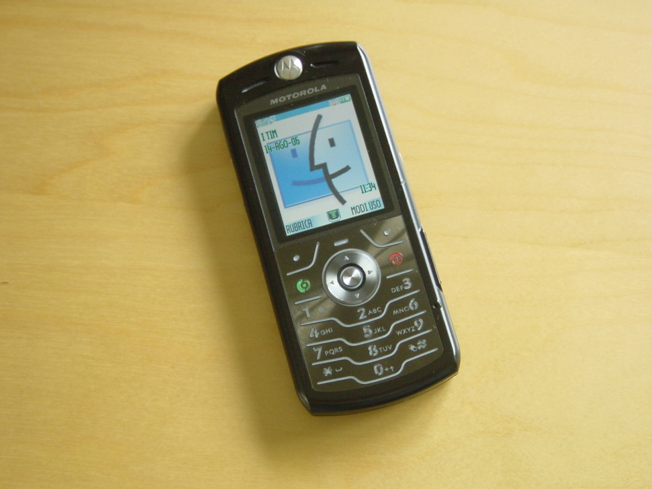 Motorola SLVR L7